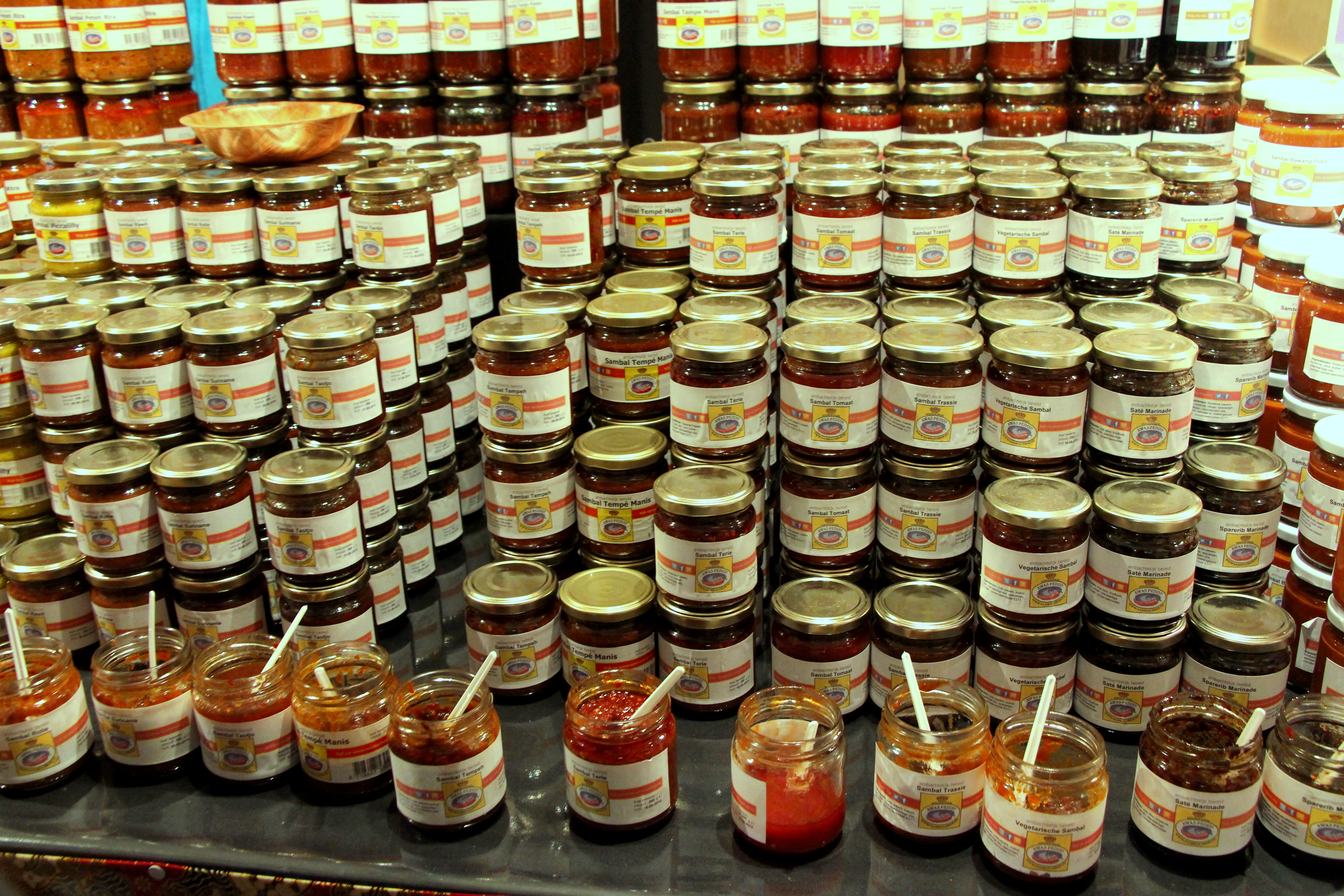 Tong Tong Fair, Den Haag. Mai 2014.